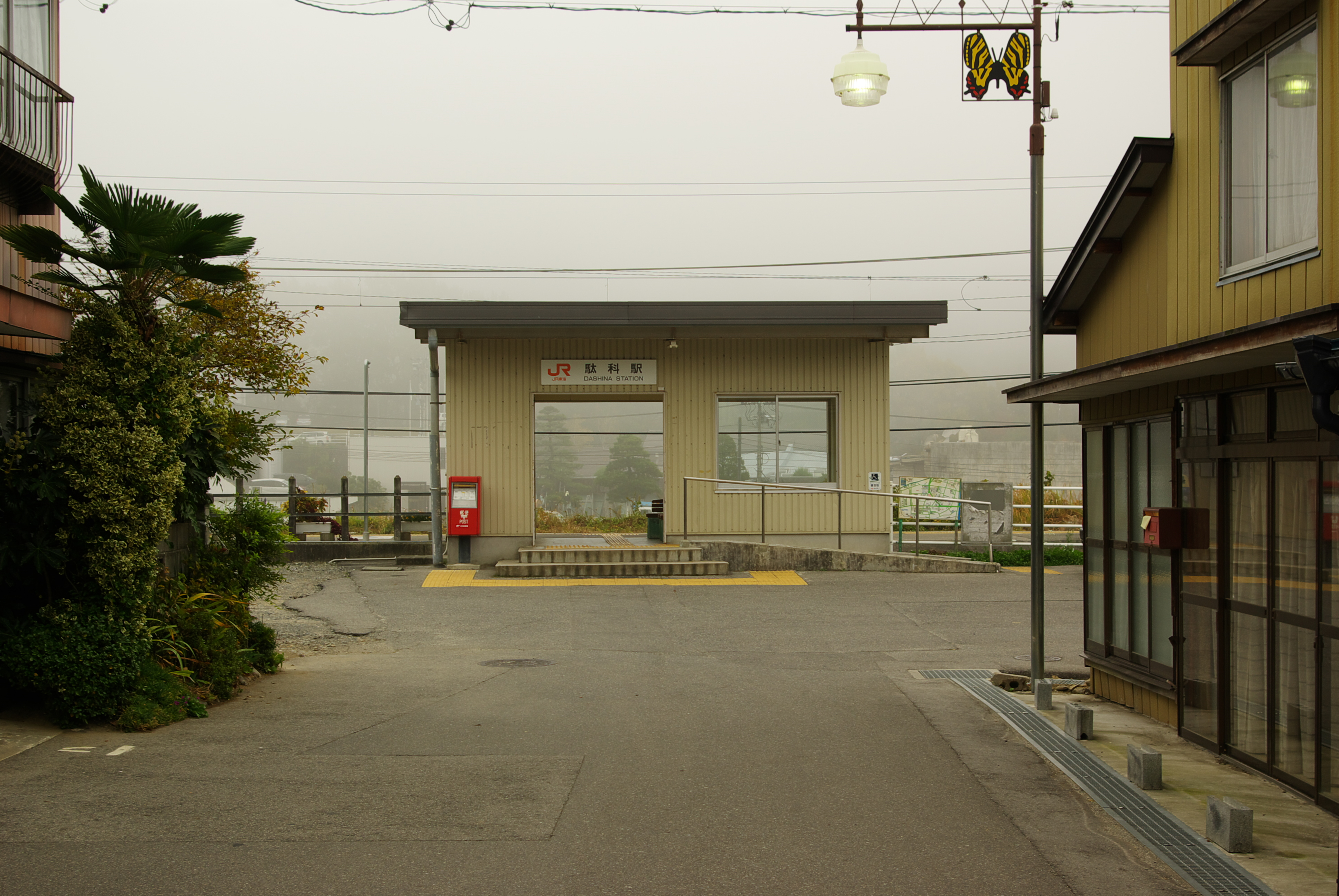 JR飯田線駄科駅